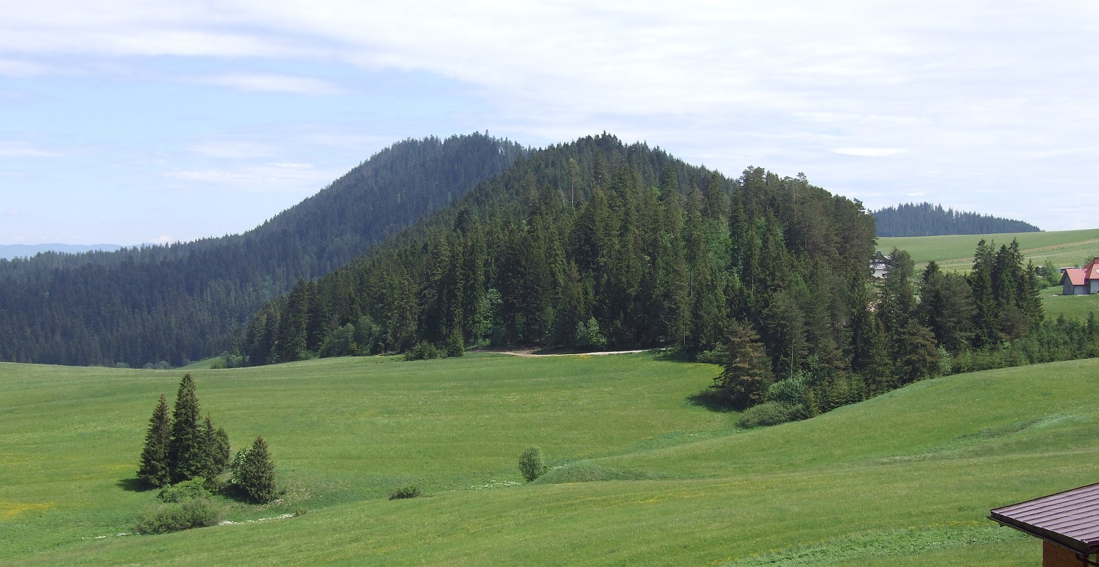 Na pierwszym planie Jurgowska Góra, z tyłu Żar. Widok z Dursztyna